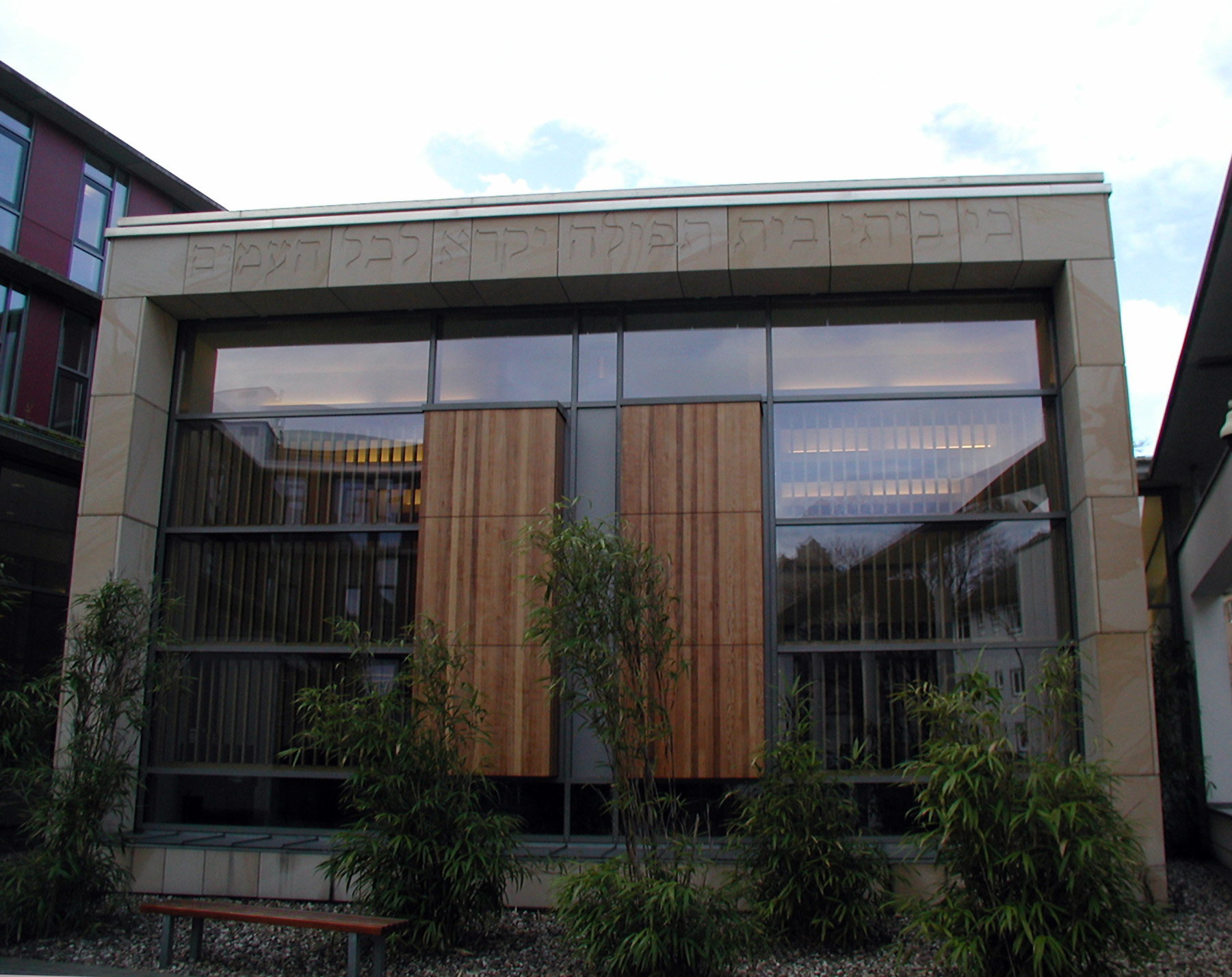 Gemeinde-Ehrenfeld-Gebetshaus, Nussb.